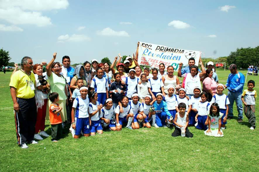 Selectivo Femenil Esc. Prim. Revolucion